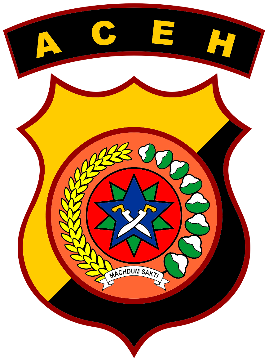 Gambar ini adalah Lambang Kepolisian Daerah Aceh